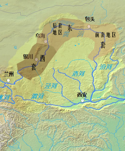 河套分布图，包括东套（前套地区、后套地区）和西套